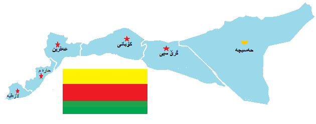 کوردی: روژاوا